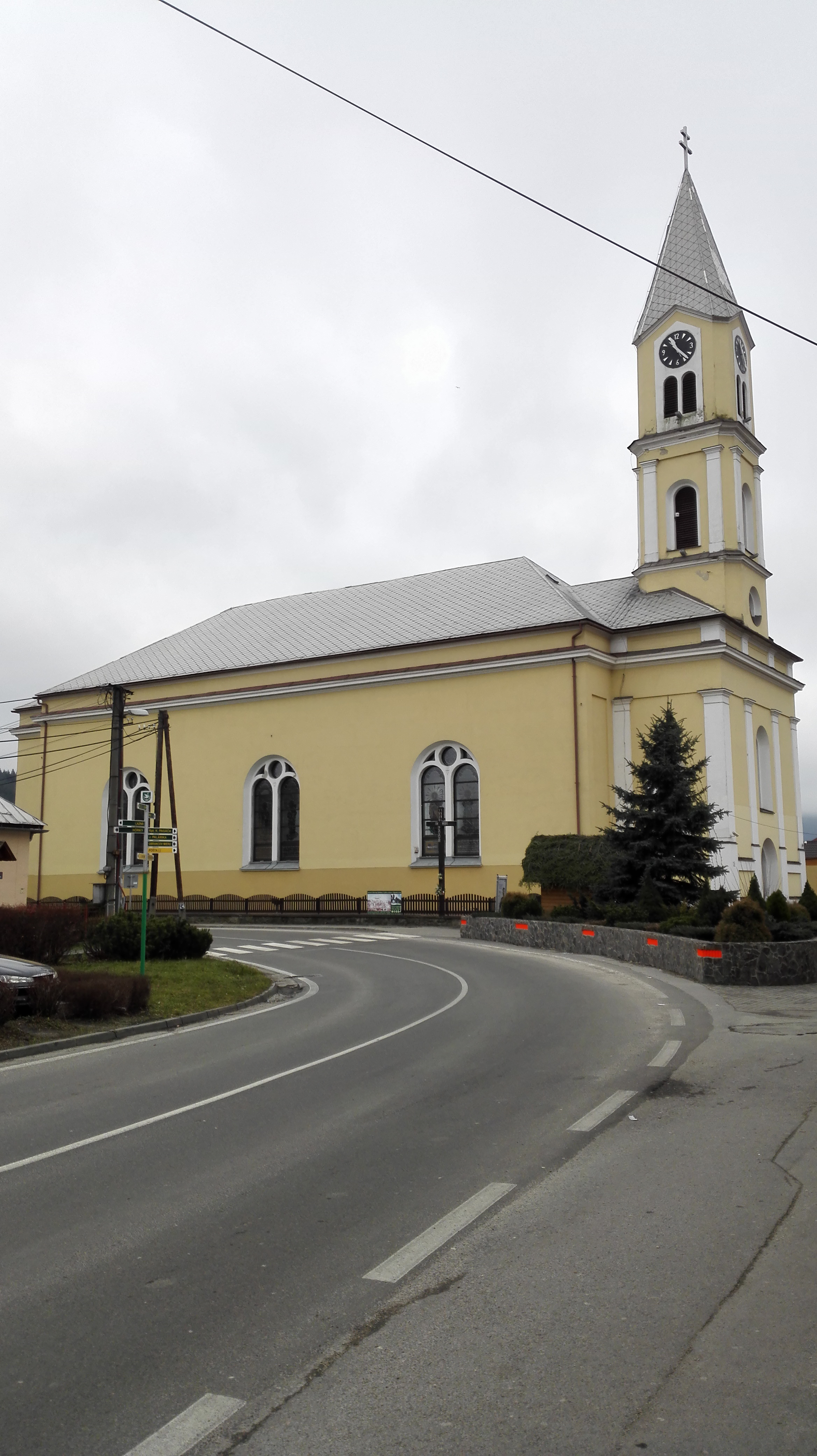 Pohľad na kostol sv. Ondreja zo severozápadu.